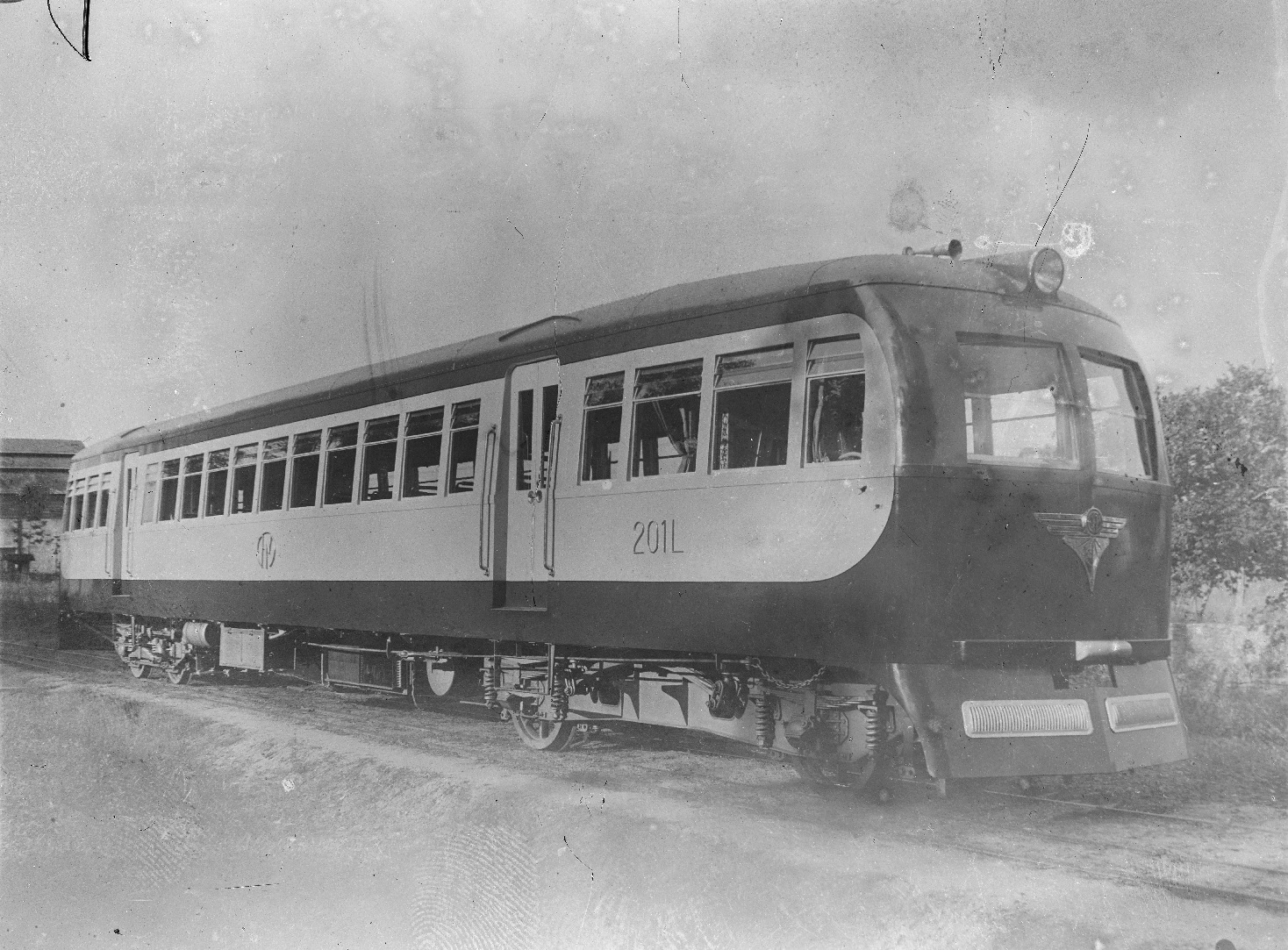 Automotriz construída pela empresa Trajano de Medeiros & Cia para a Estrada de Ferro Maricá. Essa ferrovia foi encampada pela Estrada de Ferro Central do Brasil em 1943. Imagem do Arquivo Nacional, código BR RJANRIO EH.0.FOT, EVE.6263